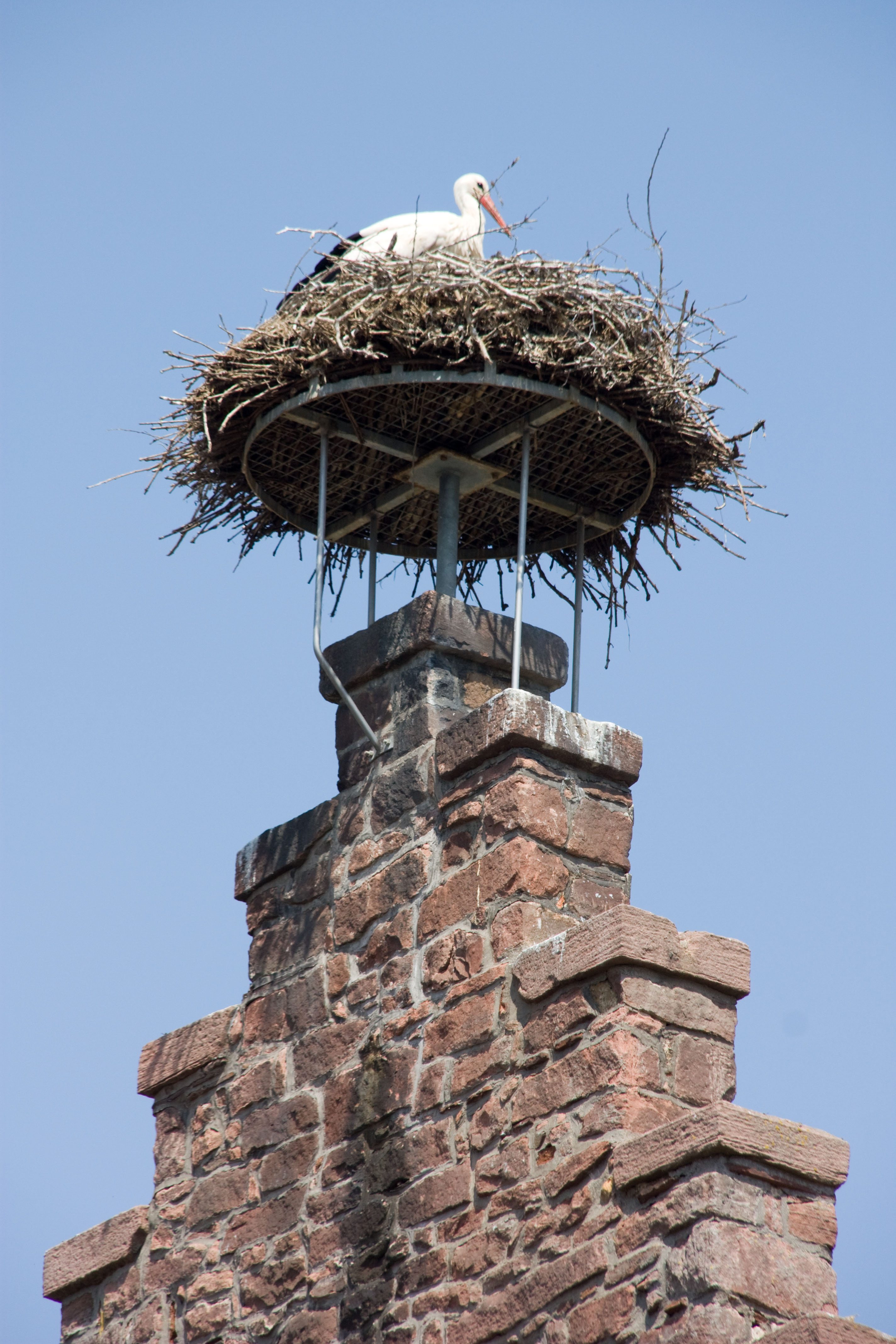 "Le mur aux cigognes", Ostheim, Haut-Rhin.